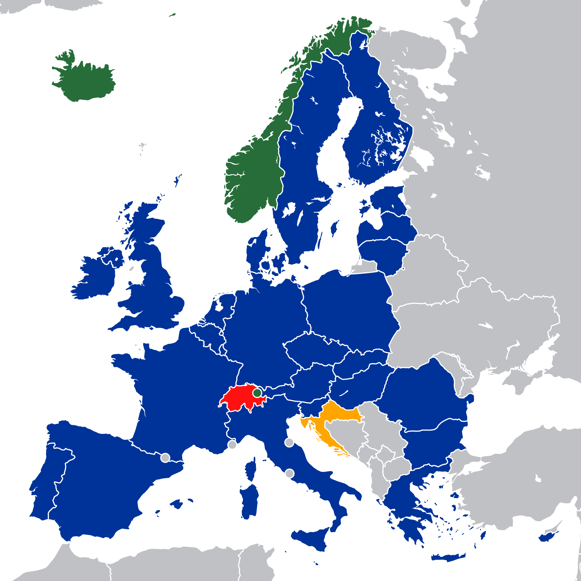 Birleşik Krallık, Fransa, Almanya, İtalya, İspanya, Yunanistan, Avusturya, Romanya, İsviçre, İsveç, Danimarka, Polonya, Çek Cumhuriyeti